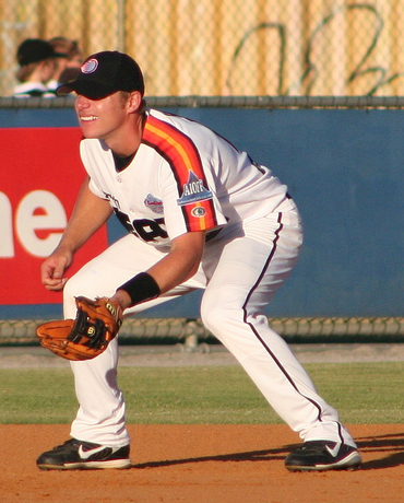 Luke Hughes